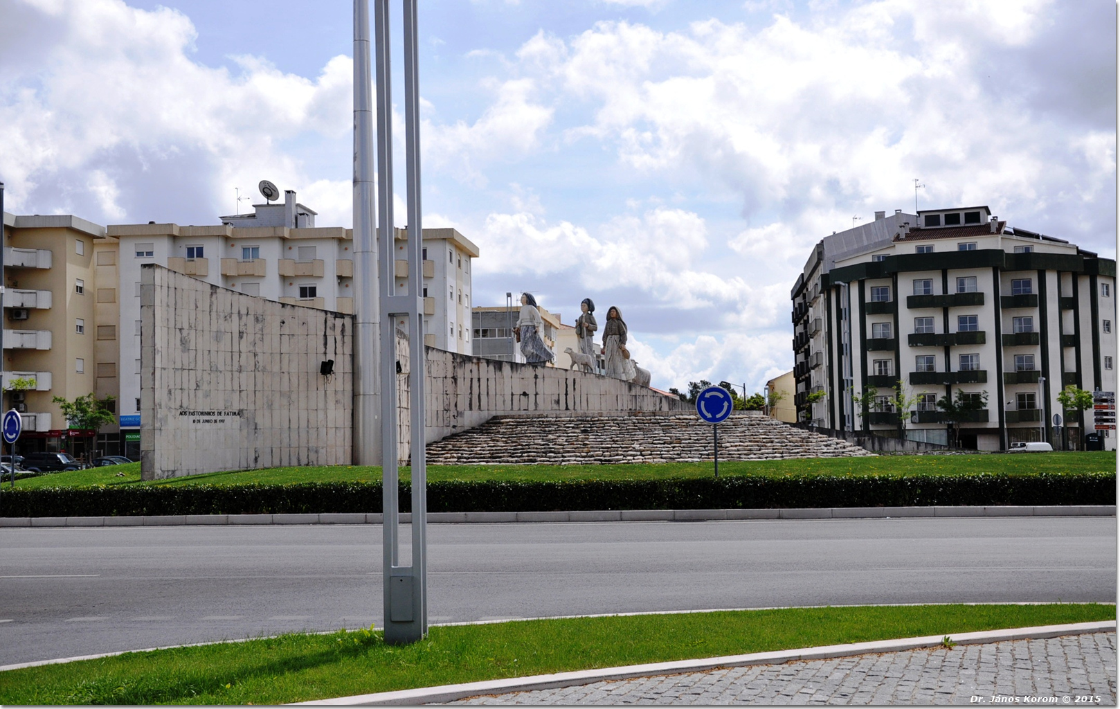 die Hirtenkinder